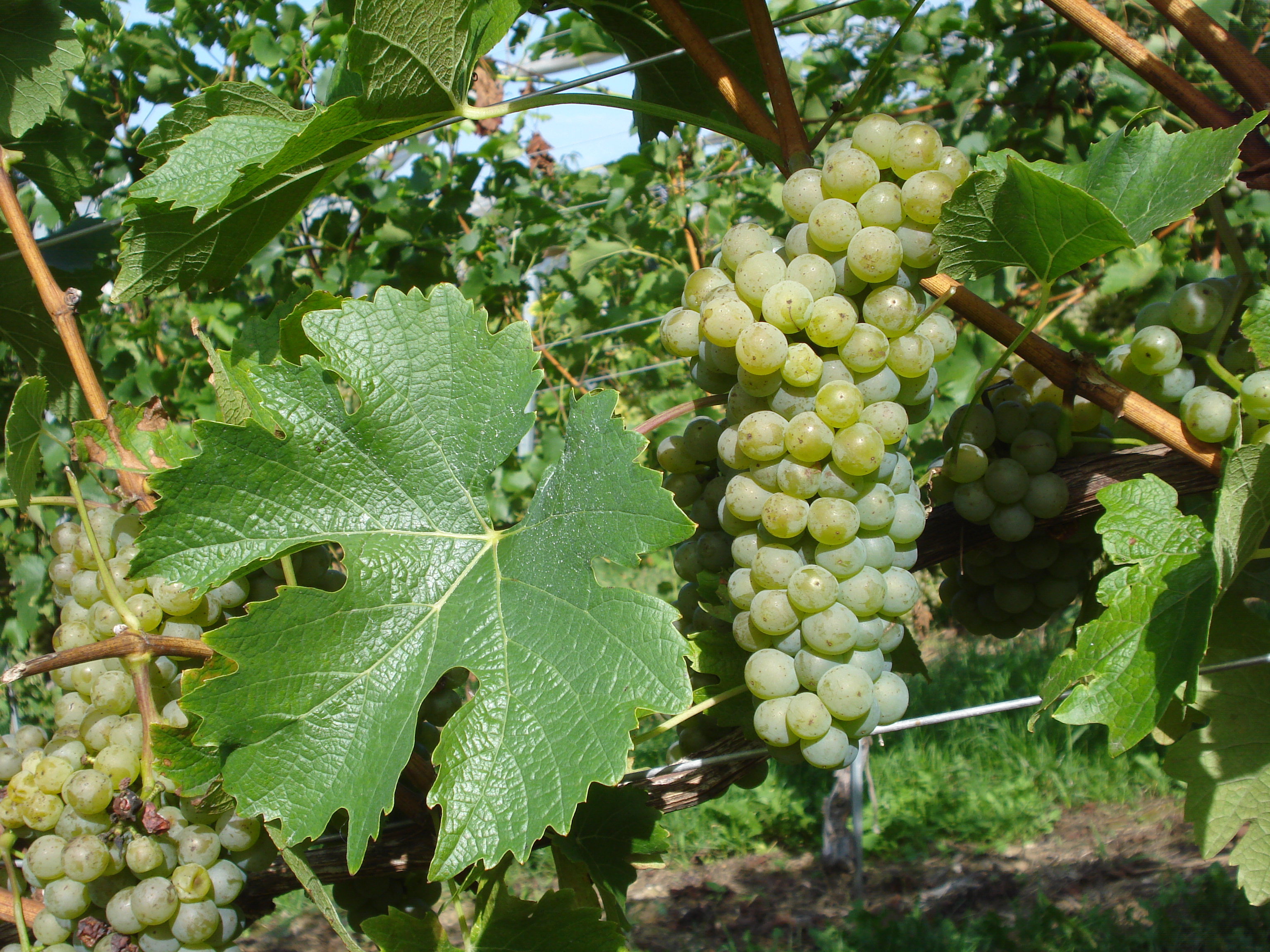 Traube und Blatt der Weißweinsorte Bronner